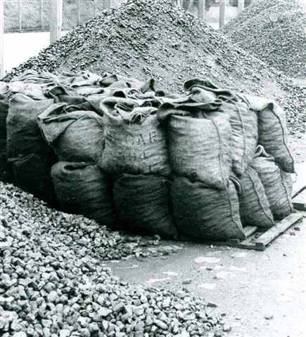 Bernd Löbach-Hinweiser: Visuelle Erlebnisfahrten durch Ostfriesland : Gestapelte Kohlesäcke. 1969, Umweltausstellung, Galerie Groh, Oldenburg.